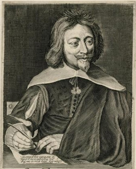 Portrait de Pierre Moreau gravé par Charles David.